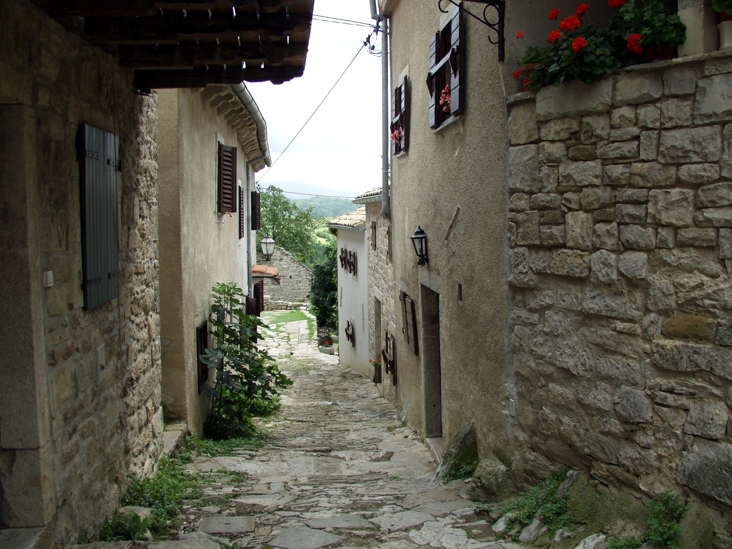 Gasse in Hum